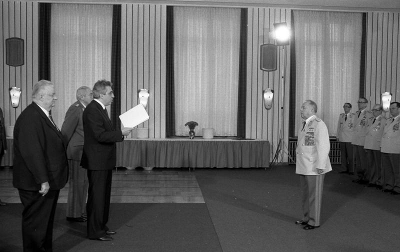 Berlin, 35. Jahrestag des Ministeriums für Staatssicherheit ADN-ZB/Mittelstädt 8.2.85 Berlin: Anläßlich des 35. Jahrestages der Bildung des Ministeriums für Staatssicherheit überbrachte Egon Krenz, Mitglied des Politbüros und Sekretär des ZK der SED (3.v.l.), die herzlichsten Glückwünsche und Kampfesgrüße der Partei- und Staatsführung, die der Minister für Staatssicherheit, Armeegeneral Erich Mielke, Mitglied des Politbrüos des ZK der SED (r.), entgegennahm. L. Werner Krolikowski, Mitglied des Politbüros des ZK der SED und Erster Stellvertreter des Vorsitzenden des Ministerrates, 2.v.l. Armeegeneral Heinz Hoffmann, Mitglied des Politbüros des ZK der SED und Minister für Nationale Verteidigung. Abgebildete Personen: Mielke, Erich: Minister für Staatssicherheit, Armeegeneral, Politbüro des Zentralkomitees (ZK) der SED, DDR (GND 118977490) Krenz, Egon: Vorsitzender der FDJ, Generalsekretär des ZK der SED, Staatsratsvorsitzender, DDR Krolikowski, Werner: Staatsratmitglied, Sekretär des Politbüros des ZK der SED, DDR